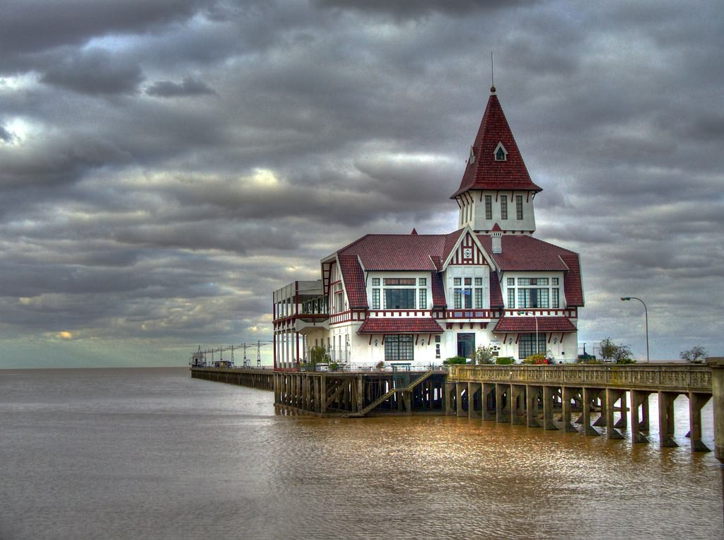 Club de Pescadores, Costanera Norte, barrio de Palermo, Buenos Aires, Argentina.